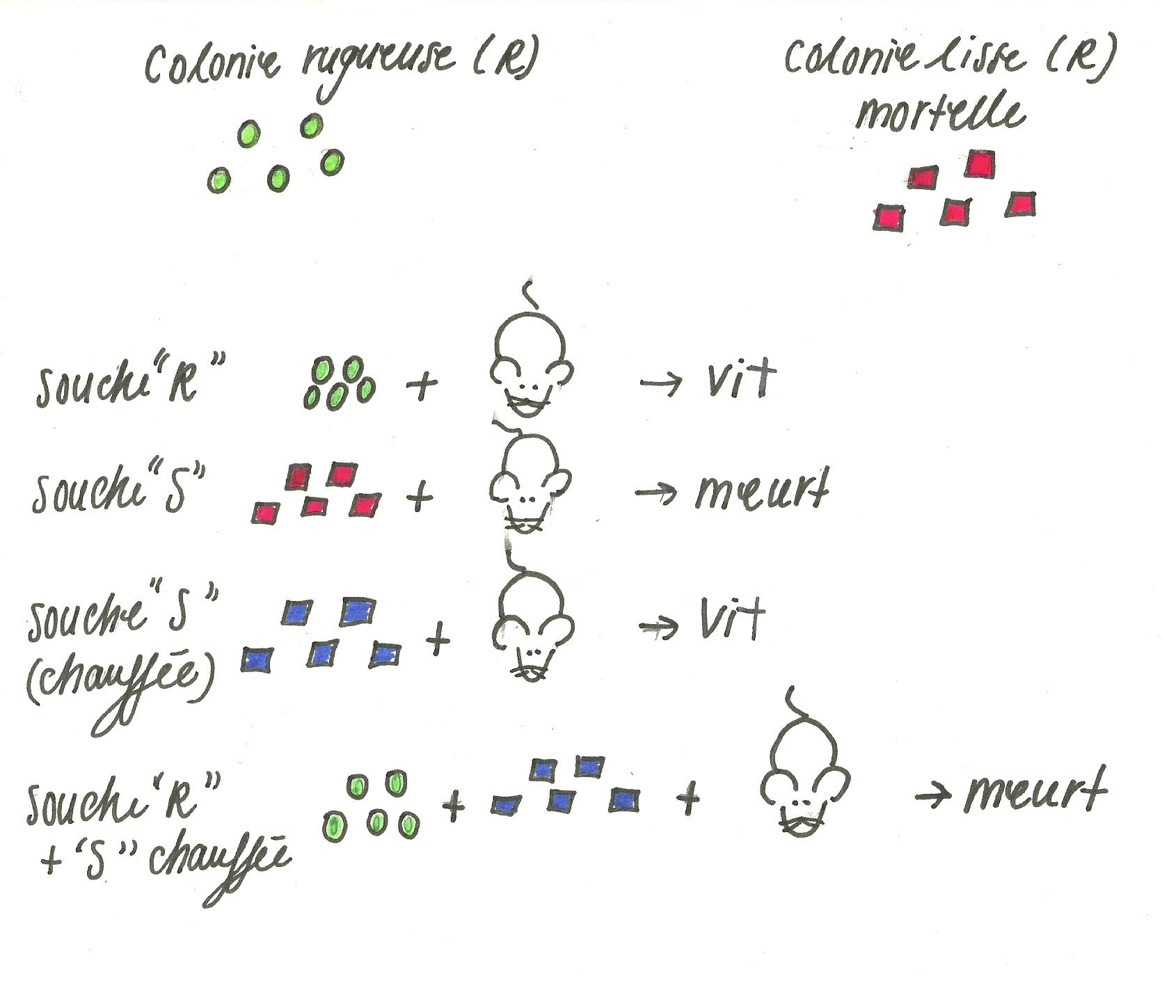 Schéma présentant l'histoire génétique des colonies et souches issues des colonies.